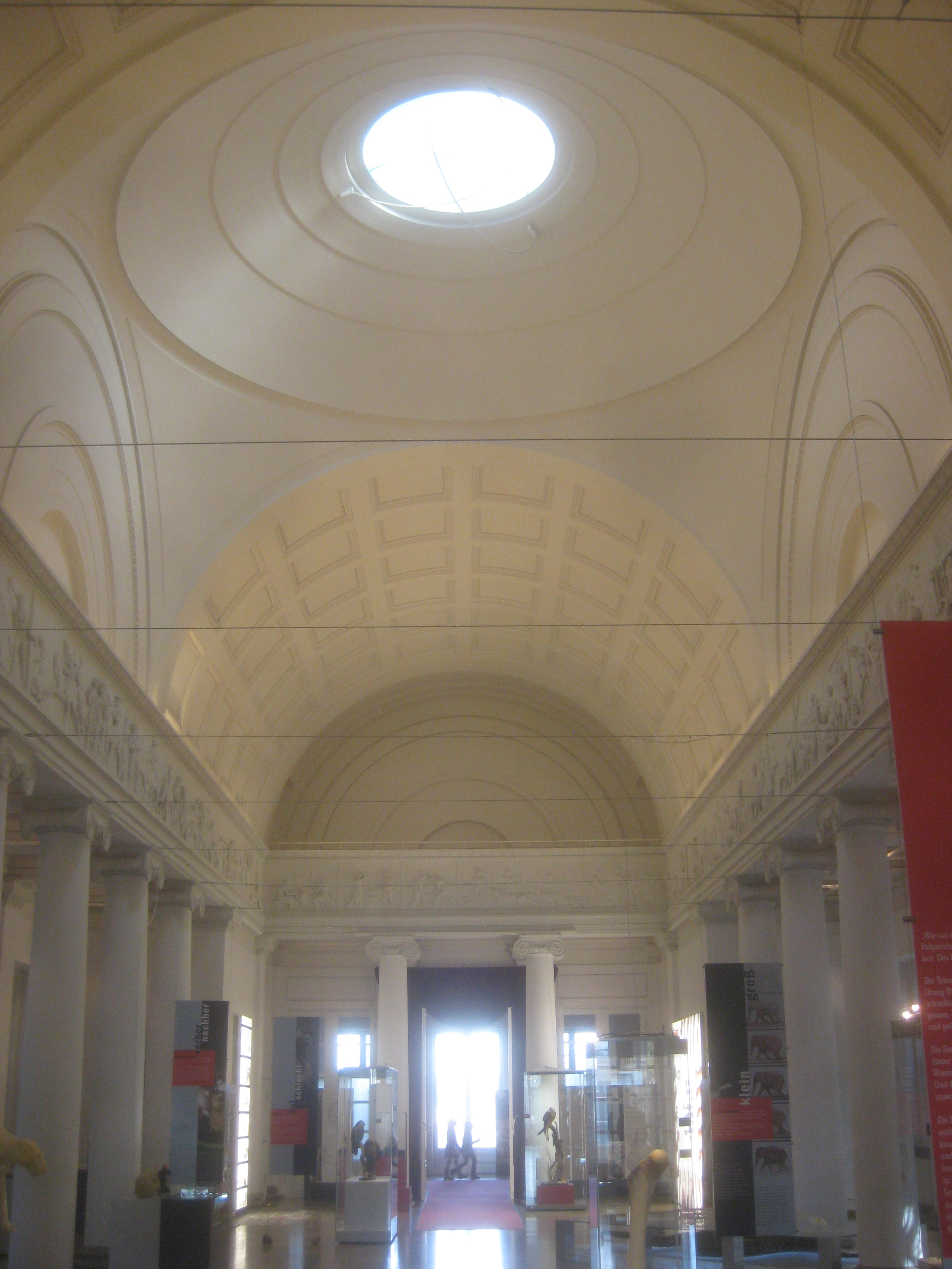 Säulenhalle (ehemals „Festsaal“) von Schloss Rosenstein in Stuttgart. Blick zum ehemaligen Speisesaal und auf Kuppel und Tonnengewölbe. Zwischen Säulen und Gewölbe: Teil des Vierjahreszeitenfrieses von Conrad Weitbrecht.